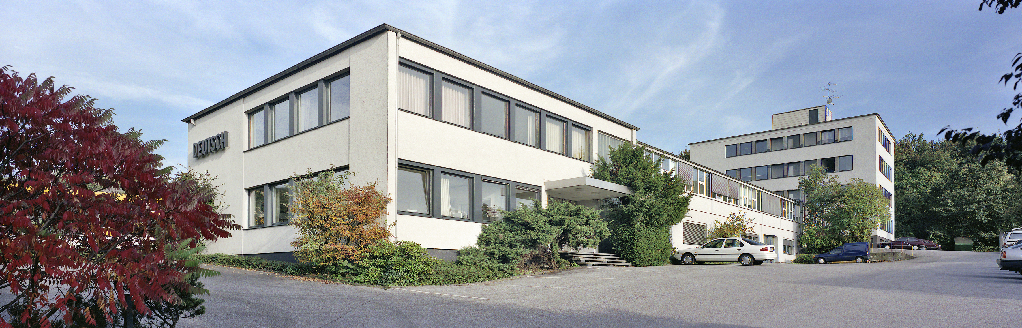 Werk 1 von KARL DEUTSCH am Otto-Hausmann-Ring.